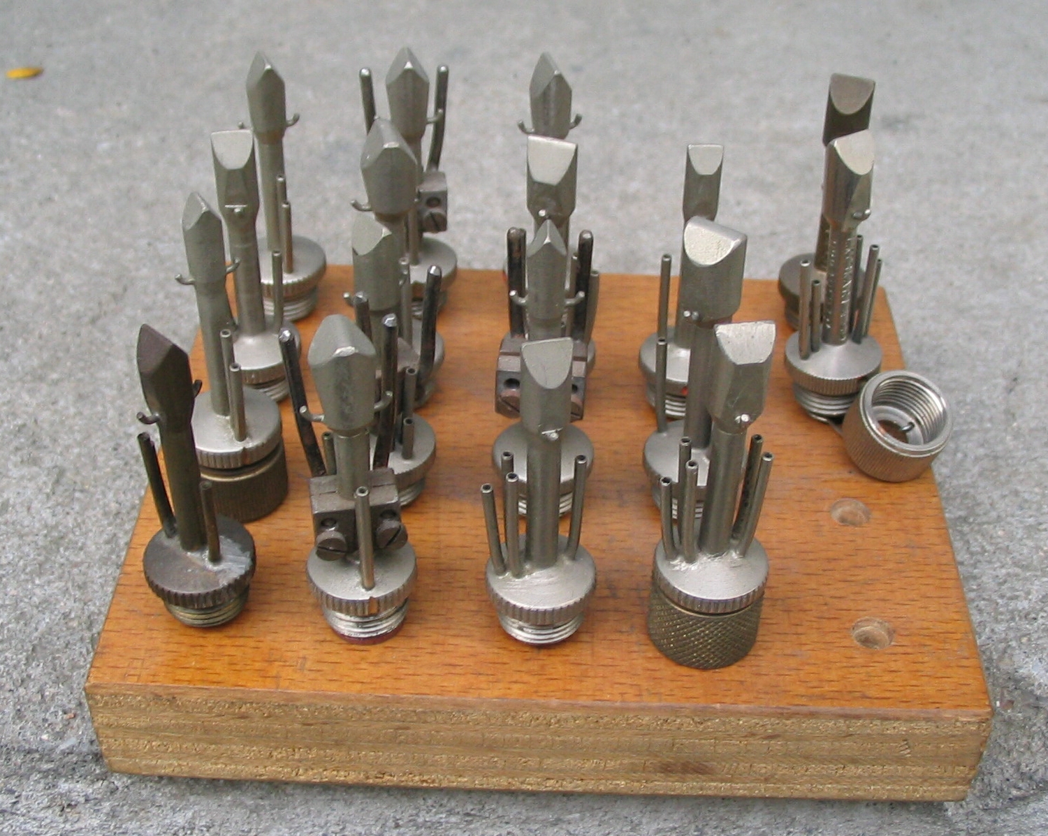 Düsen für Haareinstreichvorrichtung für Pelznähmaschinen Es handelt sich um (vielleicht eine Serie von Prototypen?) Einstreichdüsen, mit denen mit Hilfe von Pressluft beim Nähen längerer gerader Nähte die Haare von Pelzen oder pelzähnlichem Material zur Haarseite hin „eingestrichen“ werden (bevorzugt beim so genannten „Auslassen“). System Becker, Firma L. Keskari & Co siehe Patentschrift 1052784, DBP Kl. 52a D 05 b v. 12. März 1959